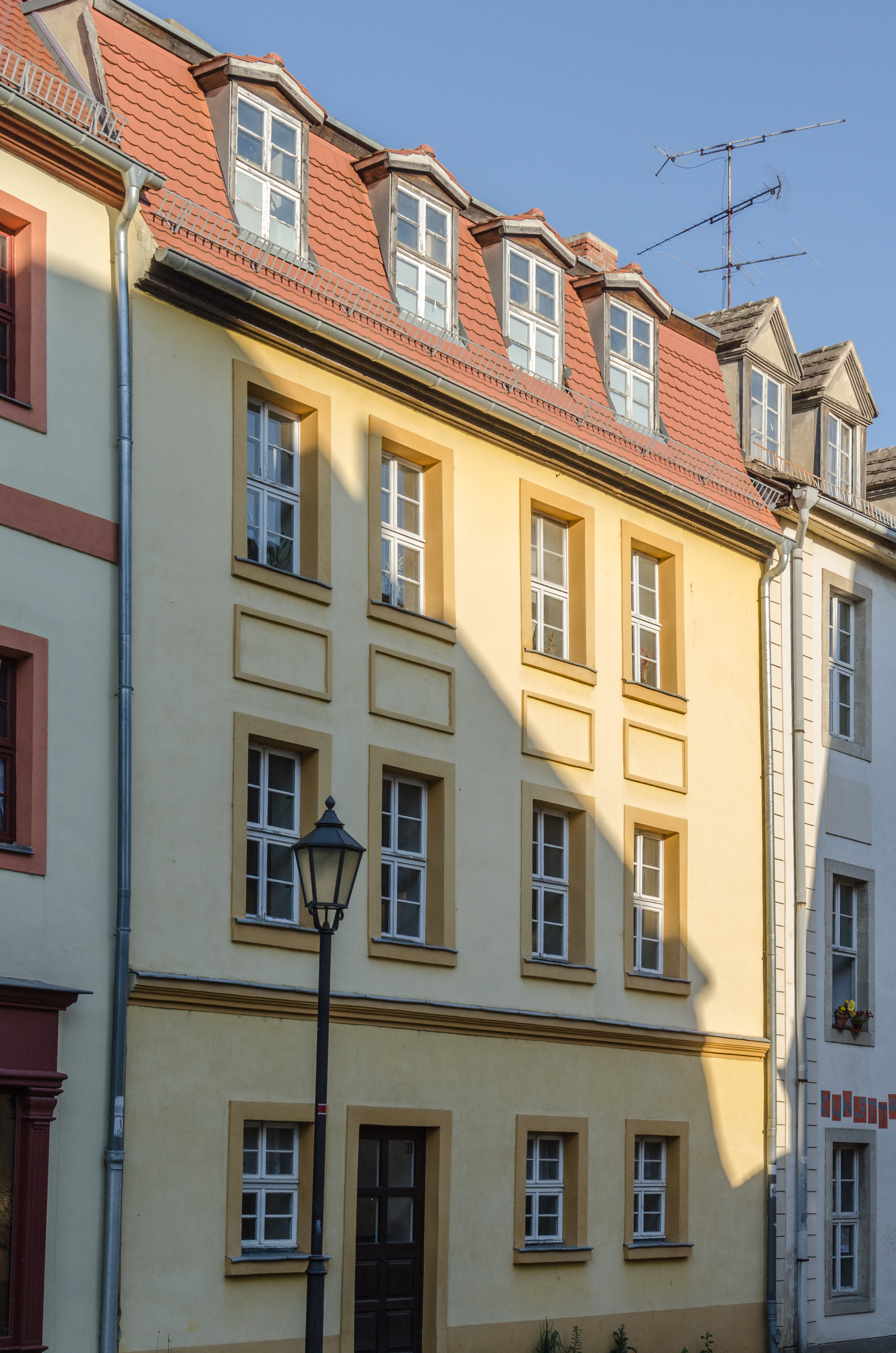 Merseburg, Domstraße 11